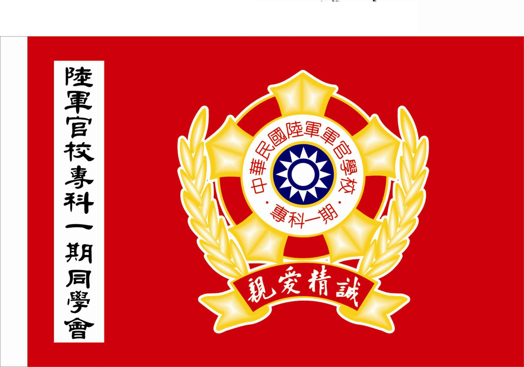 陸官專一期同學會創會會旗